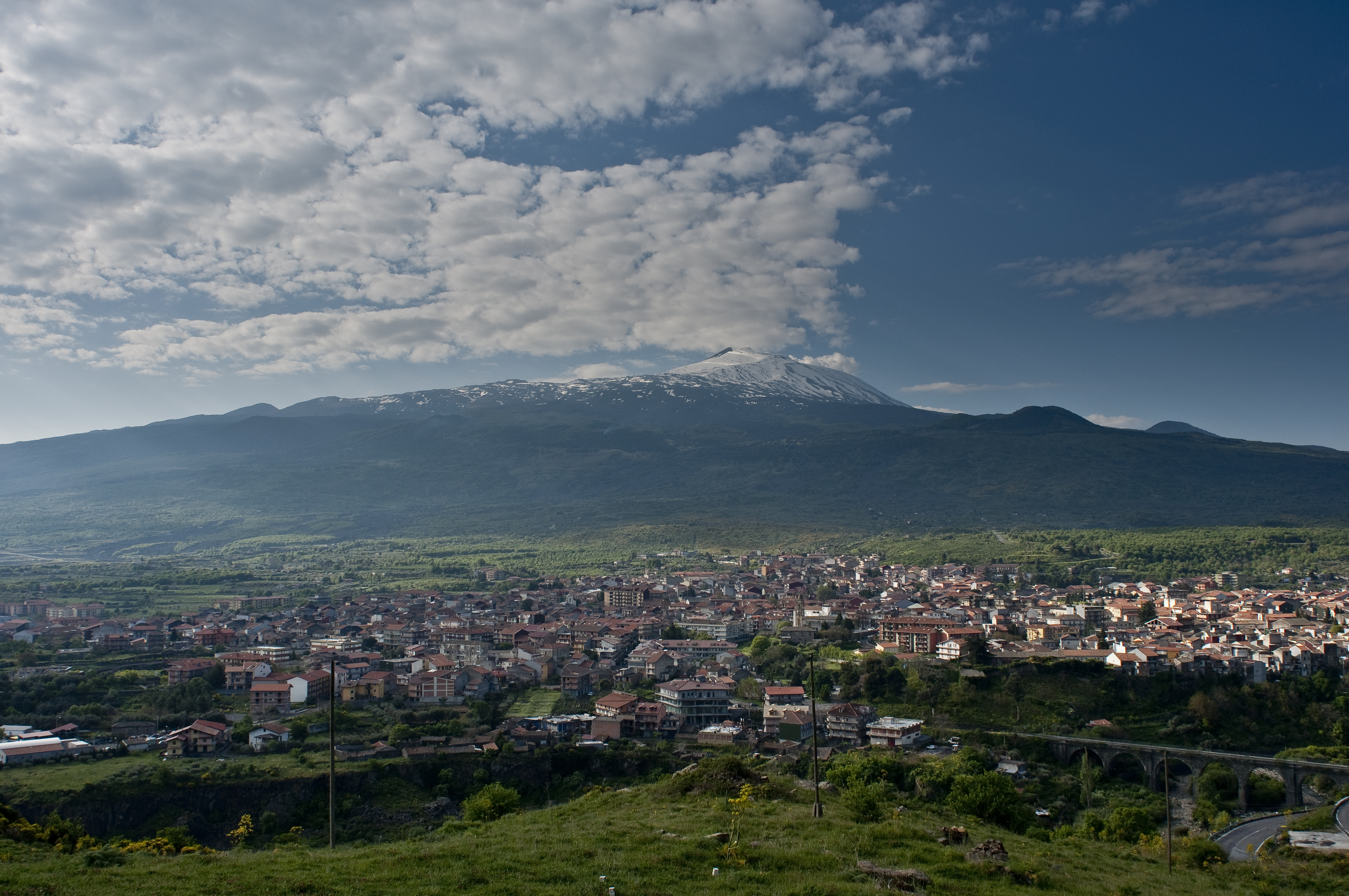 Randazzo